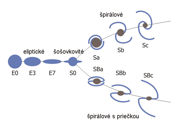 Popis: Hubblova schéma Zdroj: Soubor:Hubbleova ladicka.svg/commons Dátum: 20. 11. 2005 Autor: Redaktor:Adrian